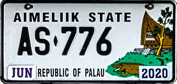 Nummernschild des Gliedstaates Aimeliik der Republik Palau, mit Zulassung für 2020